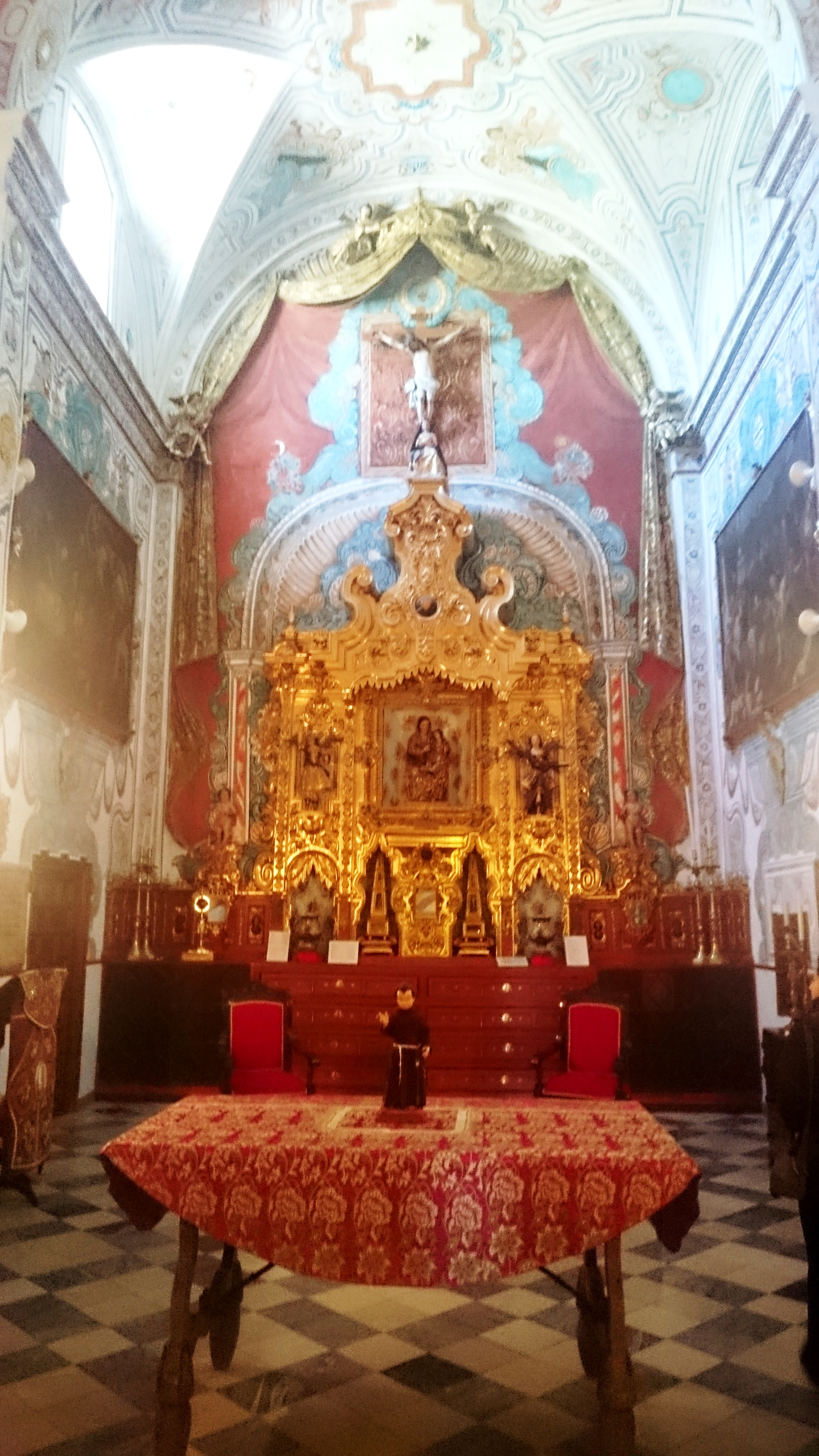 Sacristía de Nuestra Señora del Loreto en Espartinas. Sevilla. Cabecera de la antigua Iglesia, con el Retablo finalizado en 1665, encargado por Don Juan de Saavedra Alvarado Ramírez de Arellano, futuro Marques del Moscoso.